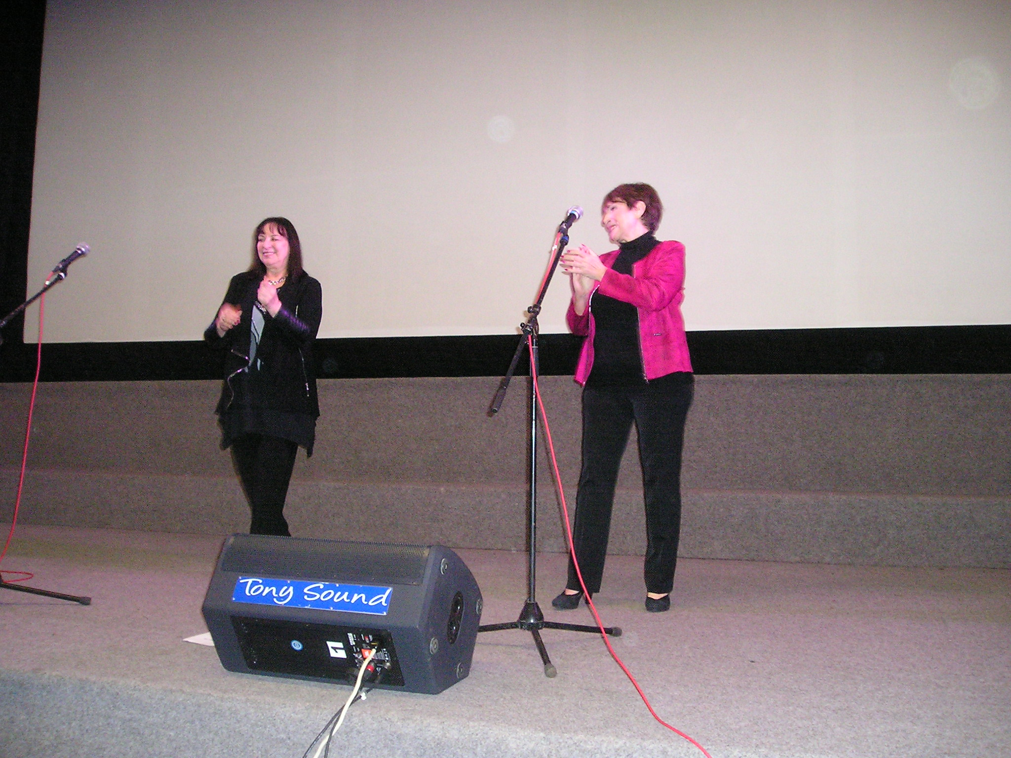 Martha a Tena Elefteriadu v Českém Těšíně 2017